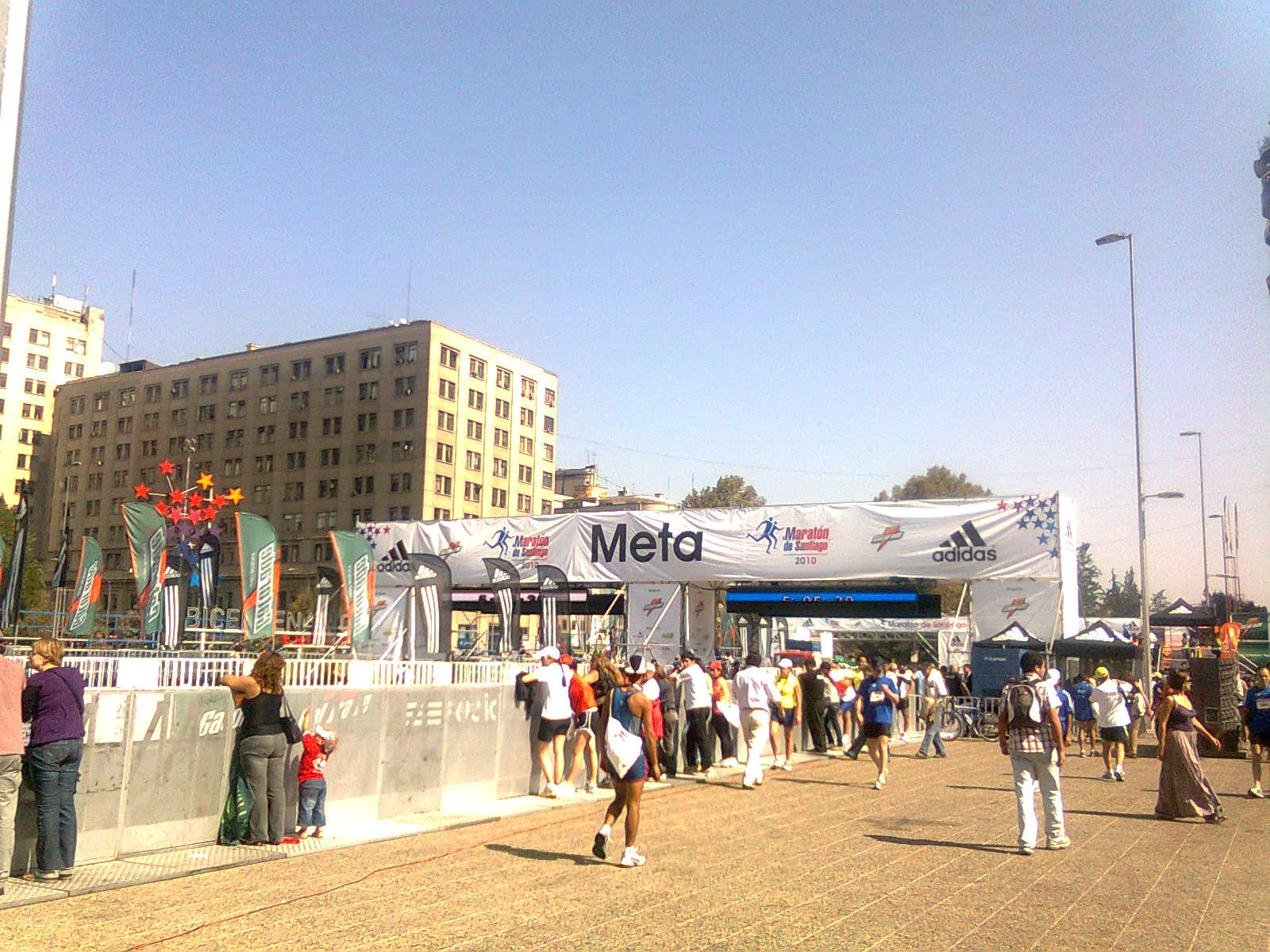 Meta de la Maratón de Santiago de Chile 2010. Meta ubicada al costado del Palacio de la Moneda.